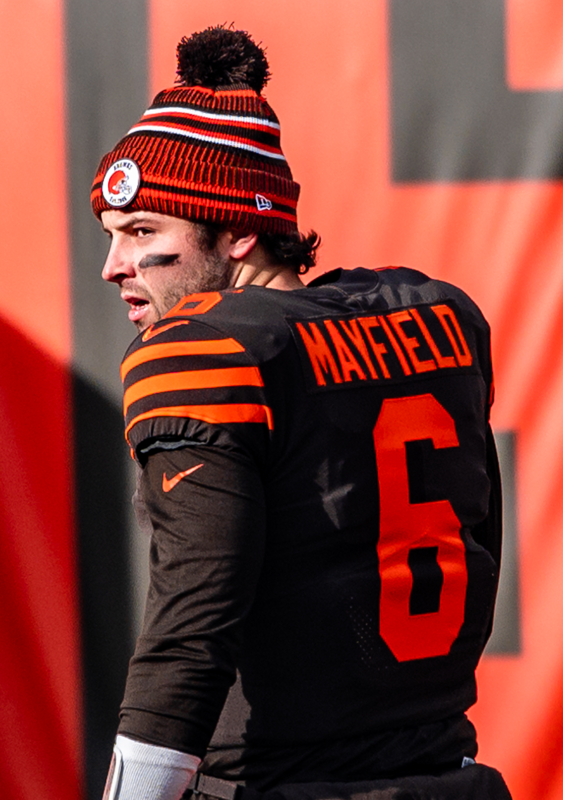 Baker Mayfield